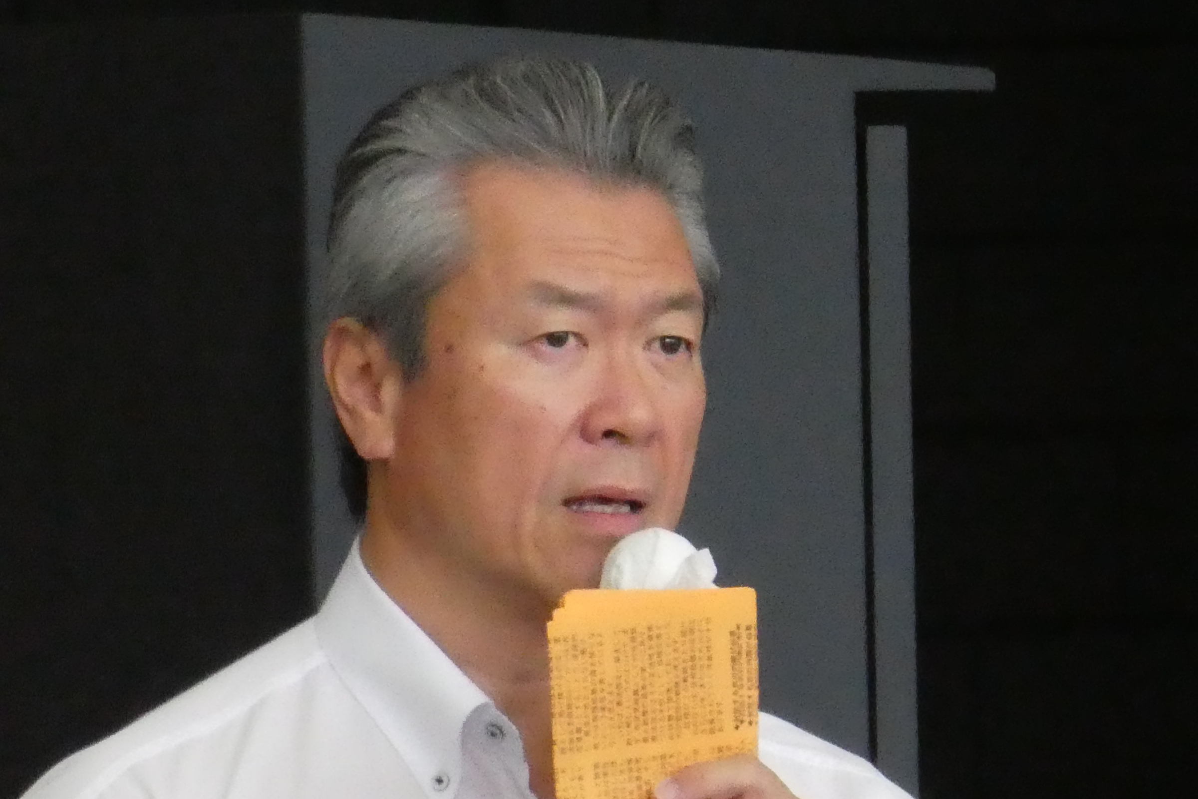 馬淵澄夫 Mabuchi Sumio 日本の政治家